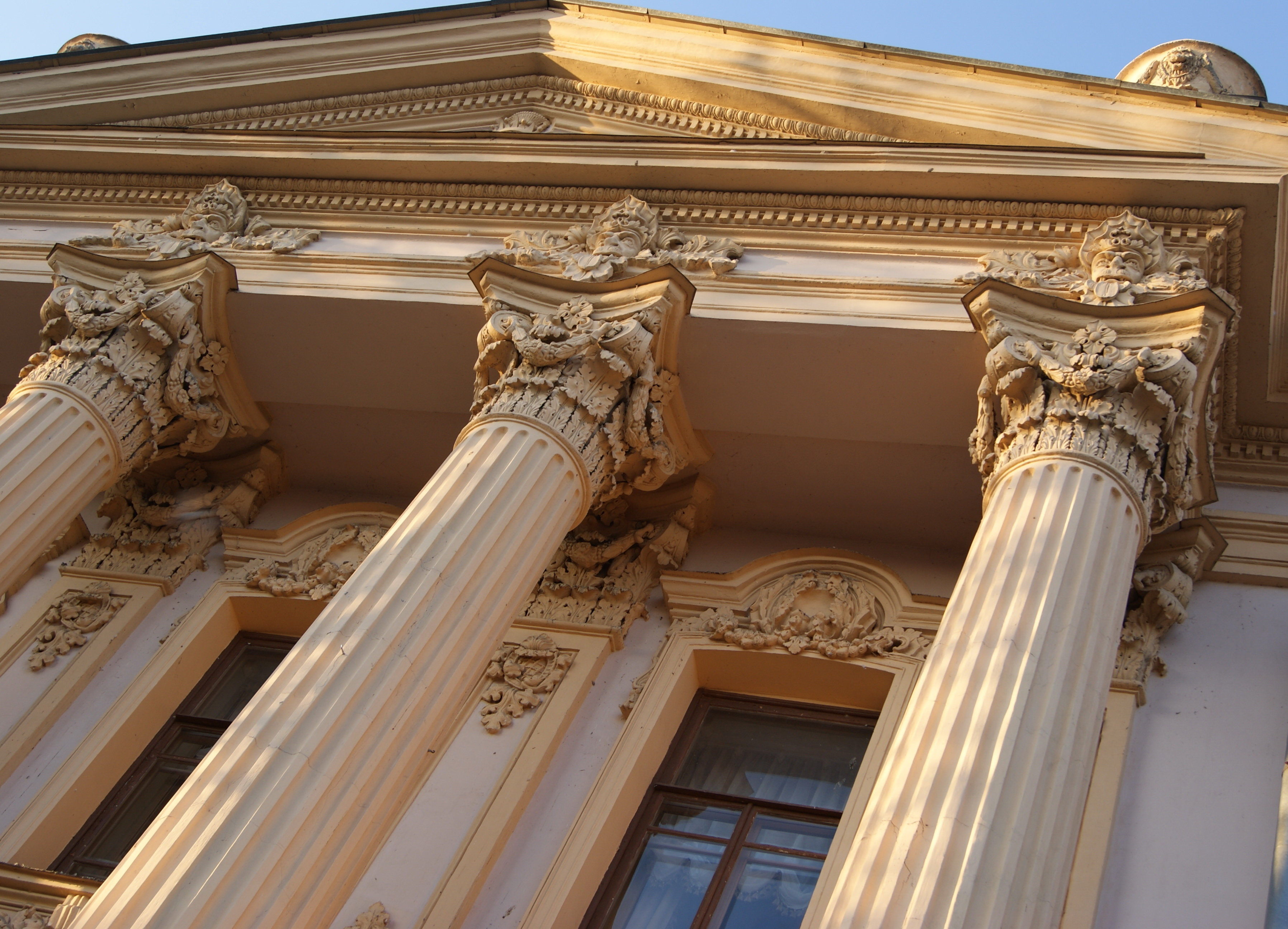 Дворец Алфераки с интерьером: улица Фрунзе, 41, Таганрог, Ростовская область